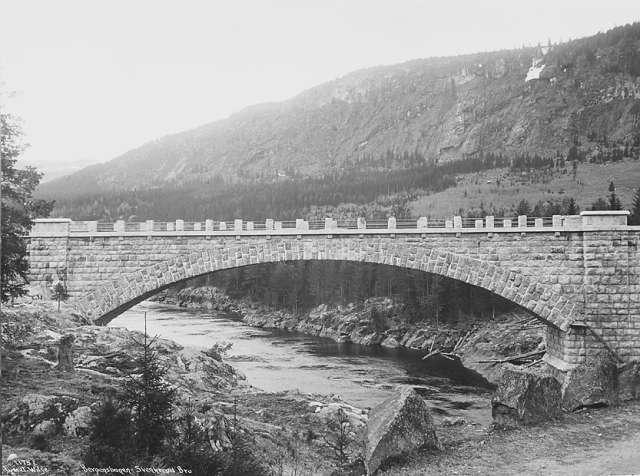 Gamle Svenkerud bru på Bergensbanen, der banen krysser Hallingdalselva ved Svenkerud.